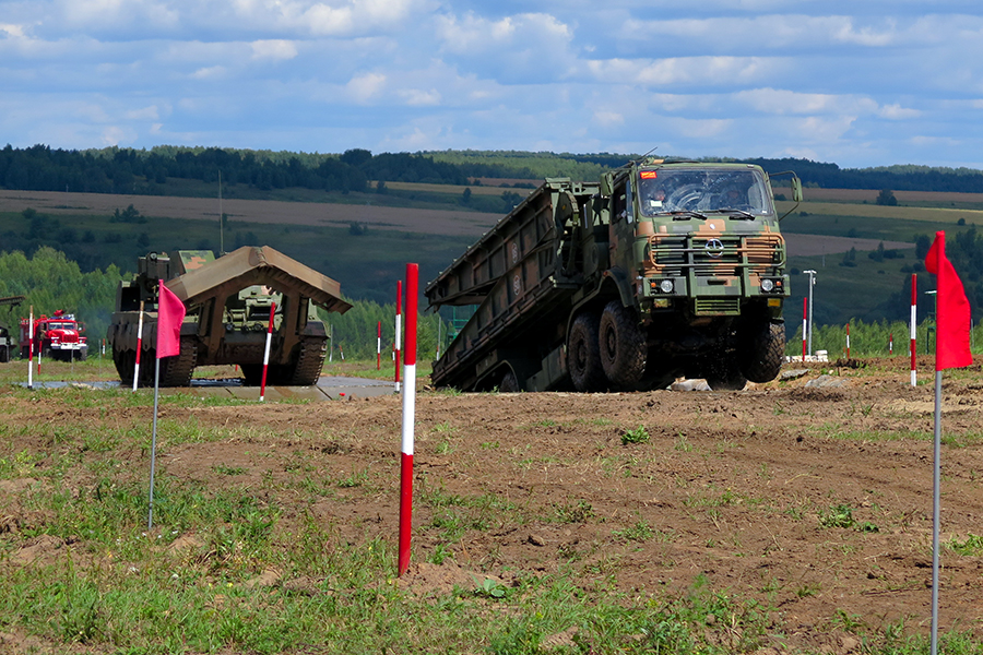 GQL-111 - Предварительное прохождение конкурса «Безопасный маршрут» командами-участницами Армейских международных игр-2015